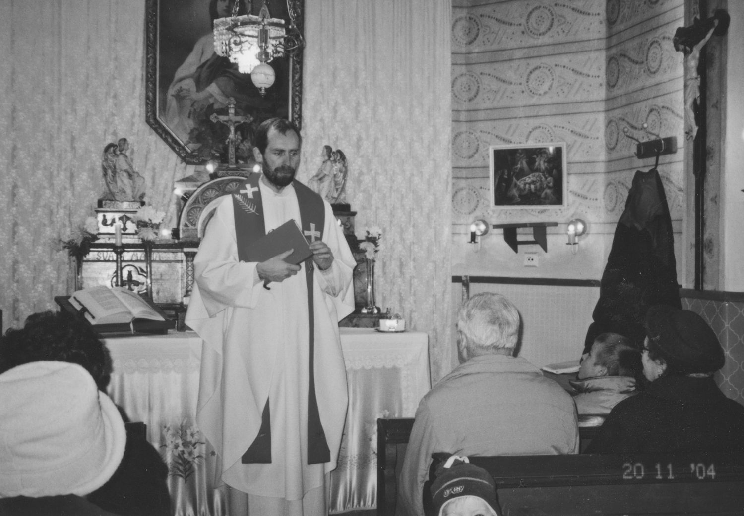 Mše v místní kapličce